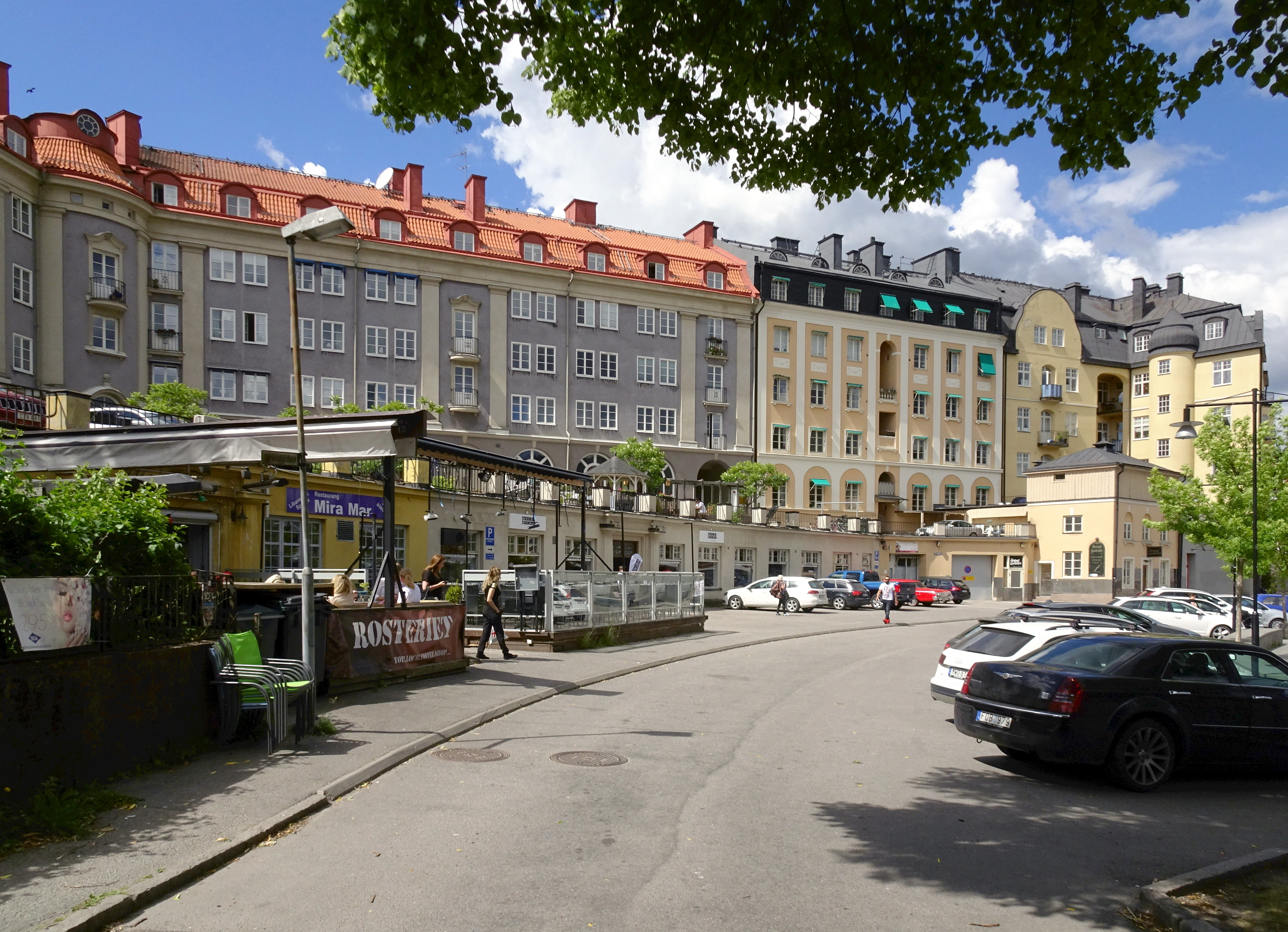 Strandgatan, Södertälje, fastigheten Väduren 10 t.v. (arkitekt Tore E:son Lindhberg 1922)